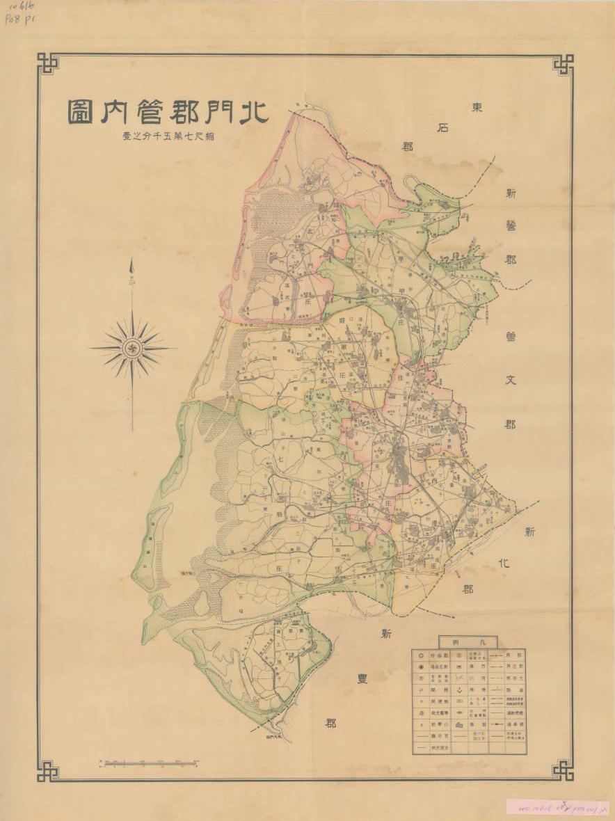 台南州北門郡轄下有佳里街、西港庄、七股庄、將軍庄、北門庄、學甲庄